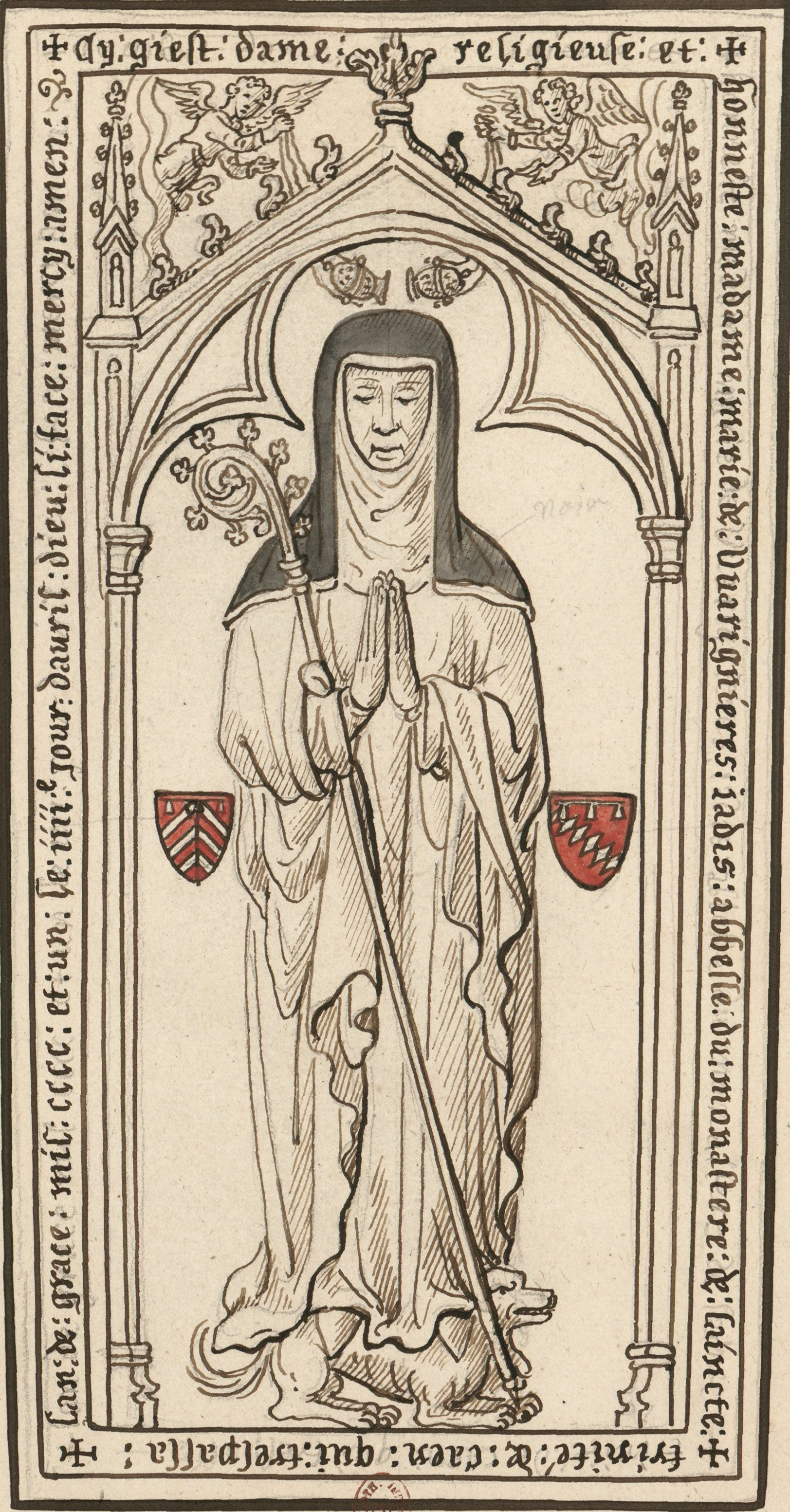 Pierre tombale sur laquelle est gravée l'effigie d'une abbesse